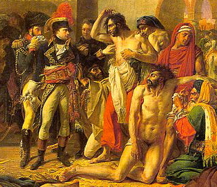 Détail du tableau d'Antoine-Jean Gros, Napoléon visitant les pestiférés de Jaffa